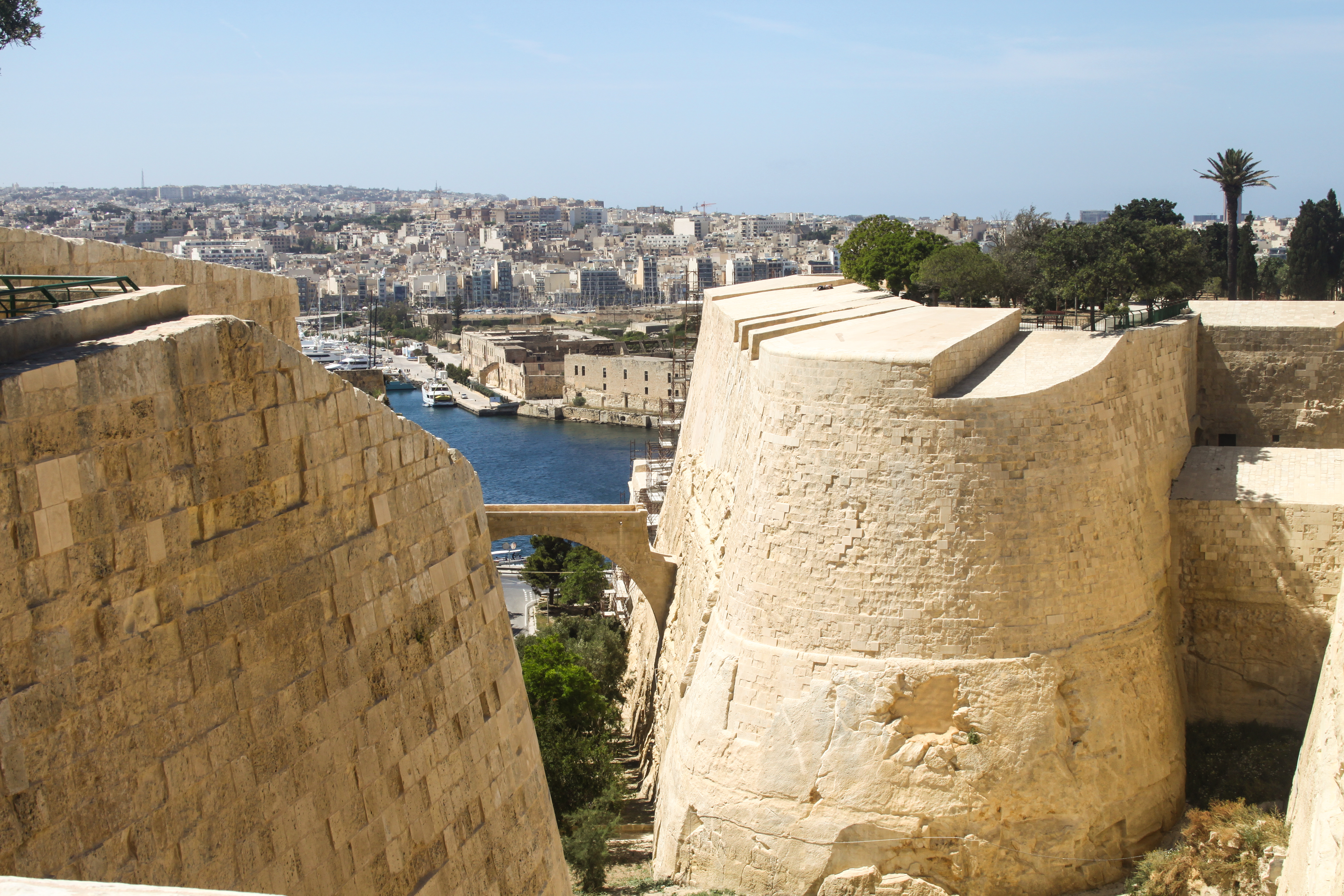 Fortification in Valletta